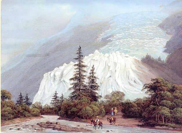 Le glacier des Bossons au plus fort de son avancée au milieu du 18ème siècle. Pour comparaison, au début des années 2000, celui-ci a reculé de plus de 1200 mètres par rapport à ce tableau.